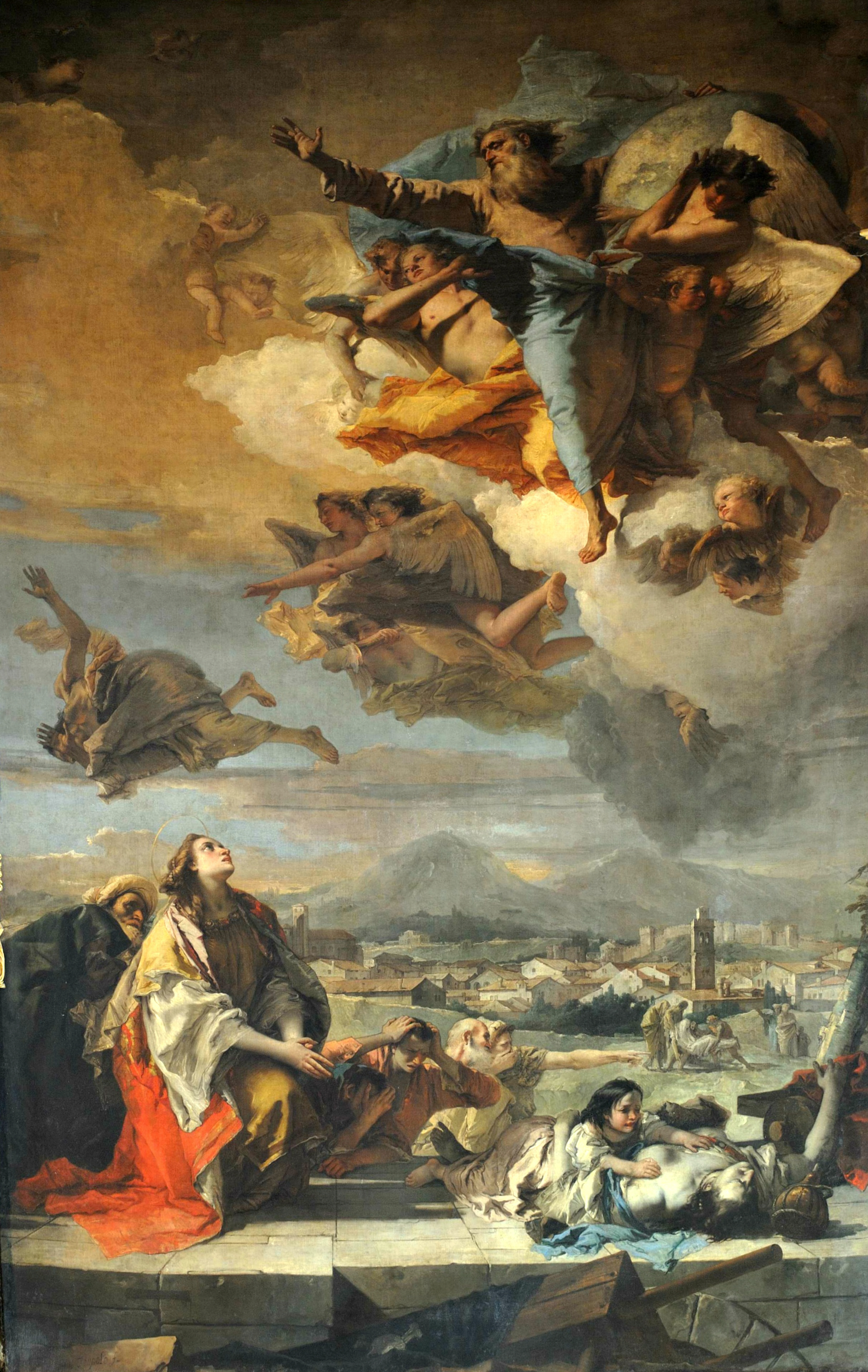 Santa Tecla libera la città di Este dalla pestilenza